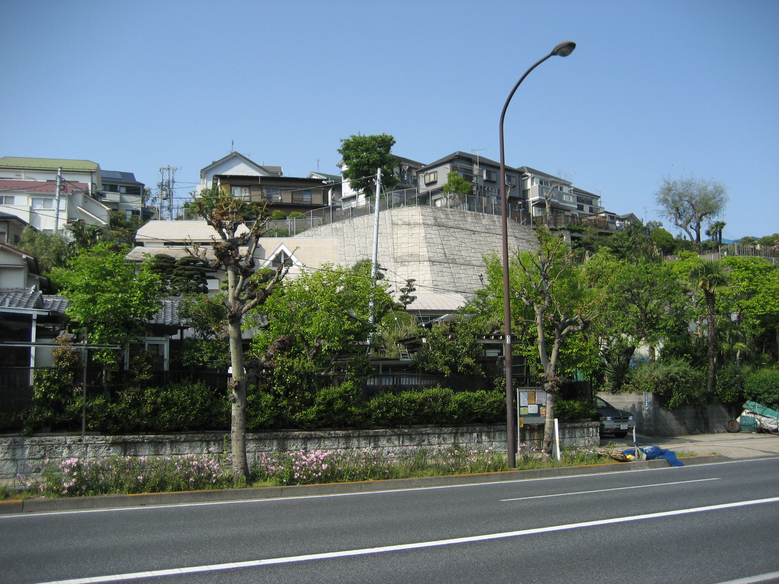 Mitsuzawa-Nakacho